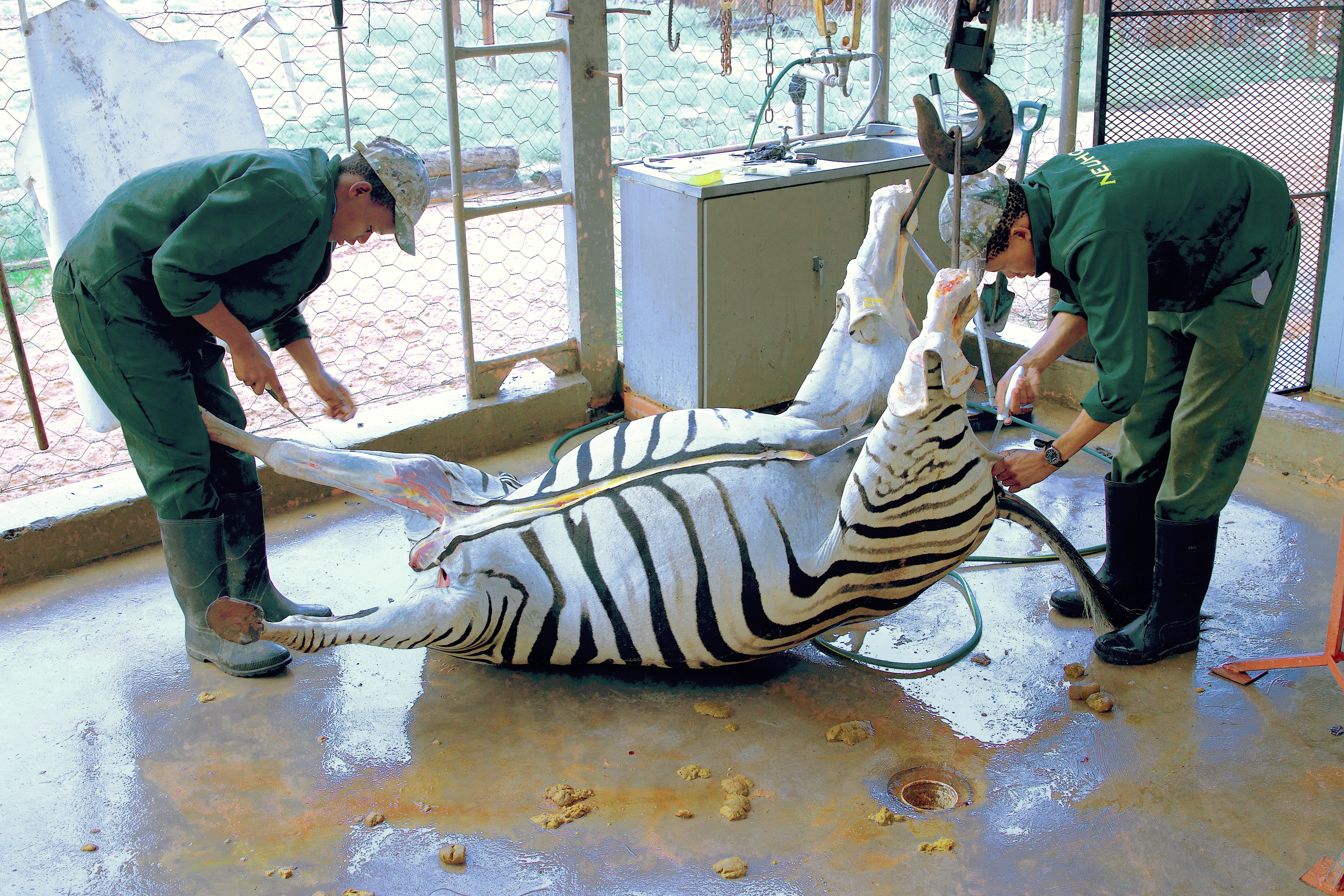 Nach der Jagd eines Zebras auf Farm Neuhof, Namibia (2018)